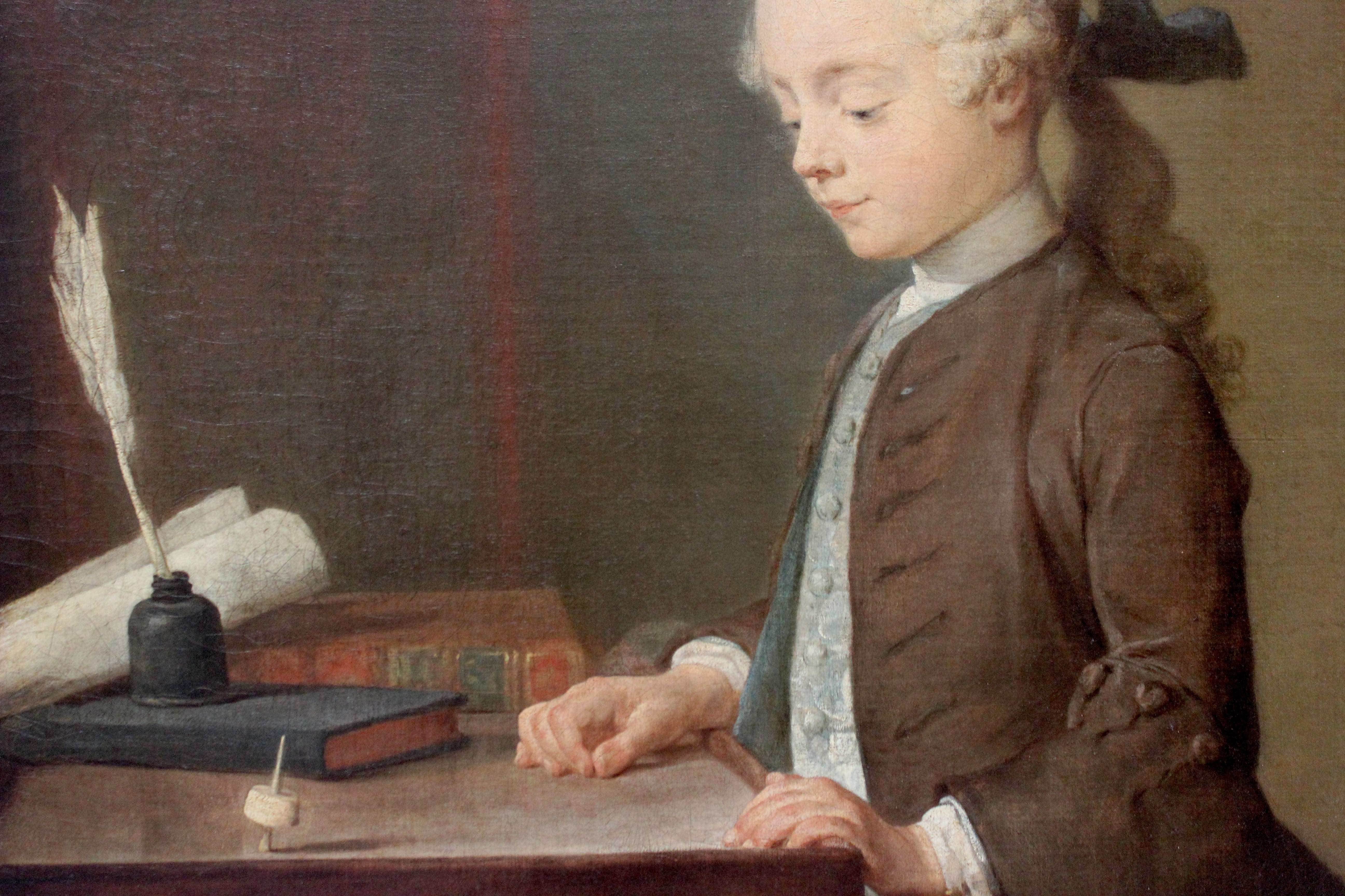 J.B. Siméon Chardin. Auguste Gabriel Godefroy. Louvre.